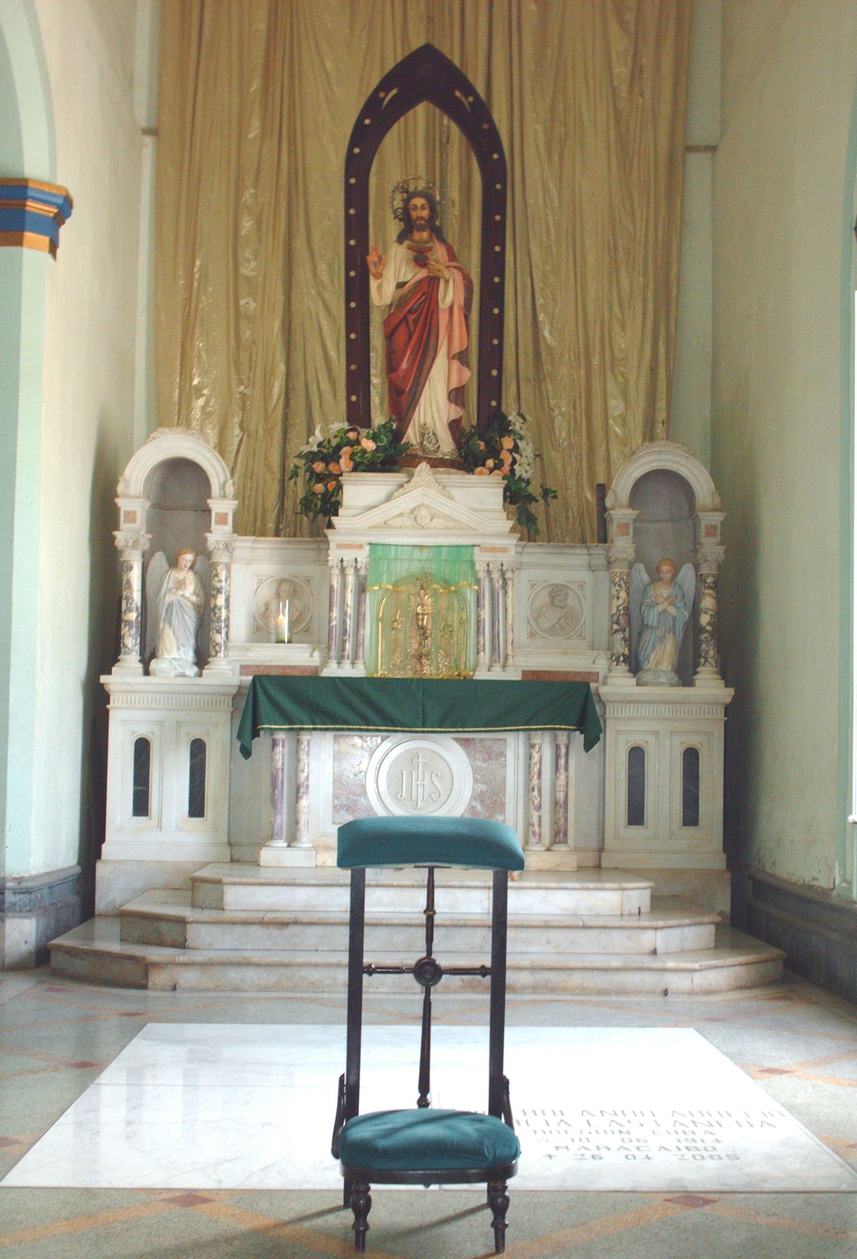 Interior de la Iglesia de Santa Bárbara, Maracaibo, Estado Zulia, Venezuela.